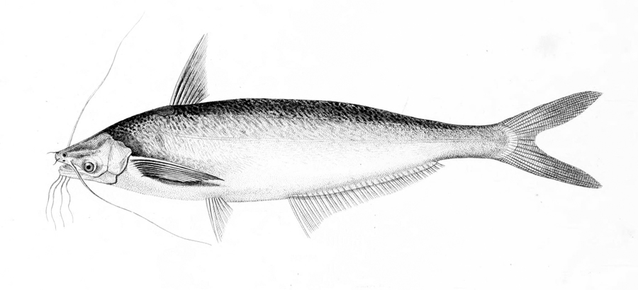 Clupisoma garua